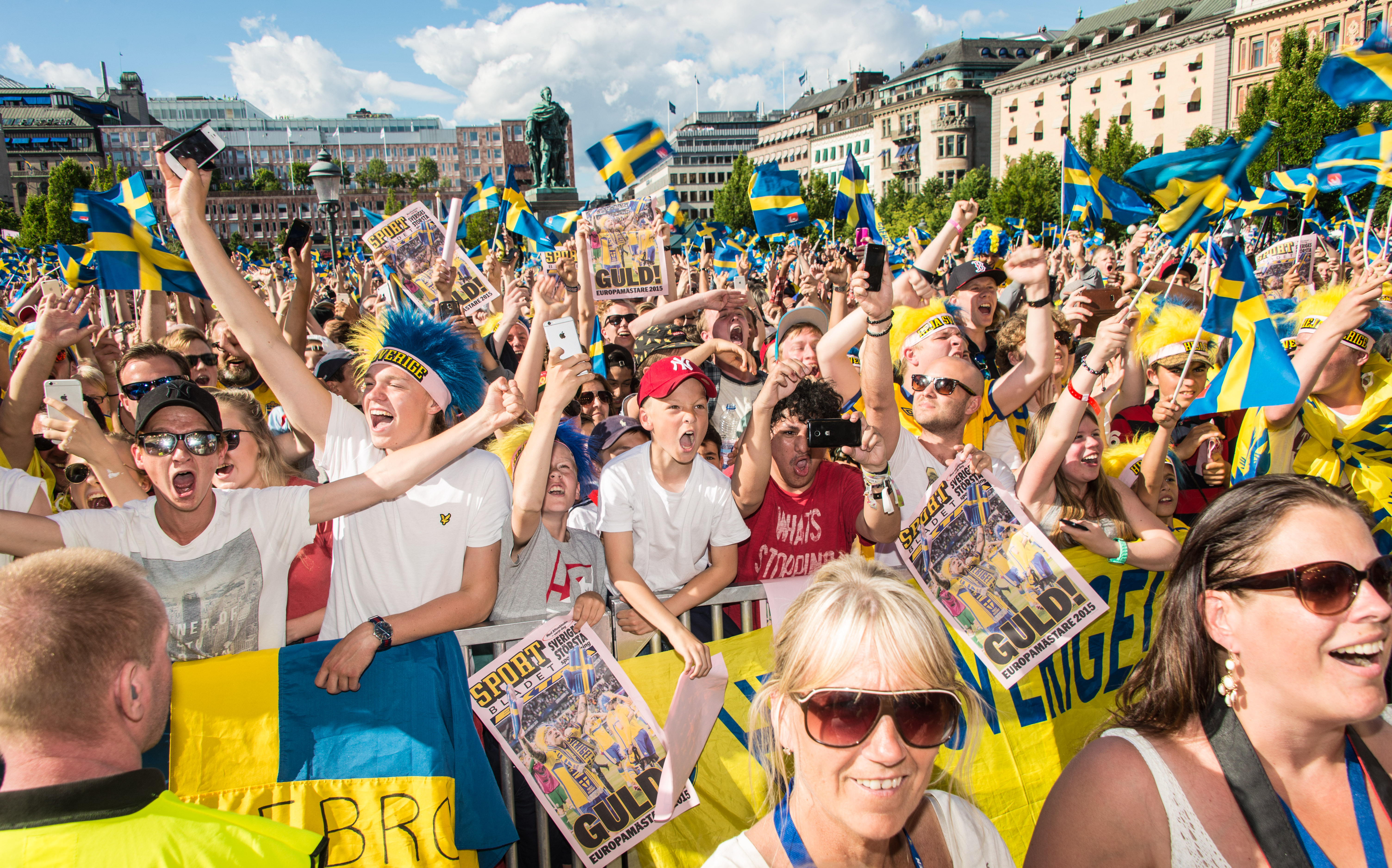 Sveriges U21-landslag blir firad i Kungsträdgården i Stockholm den 1 juli av 1000-tals fans efter guldet i U21-Europamästerskapet i fotboll 2015.